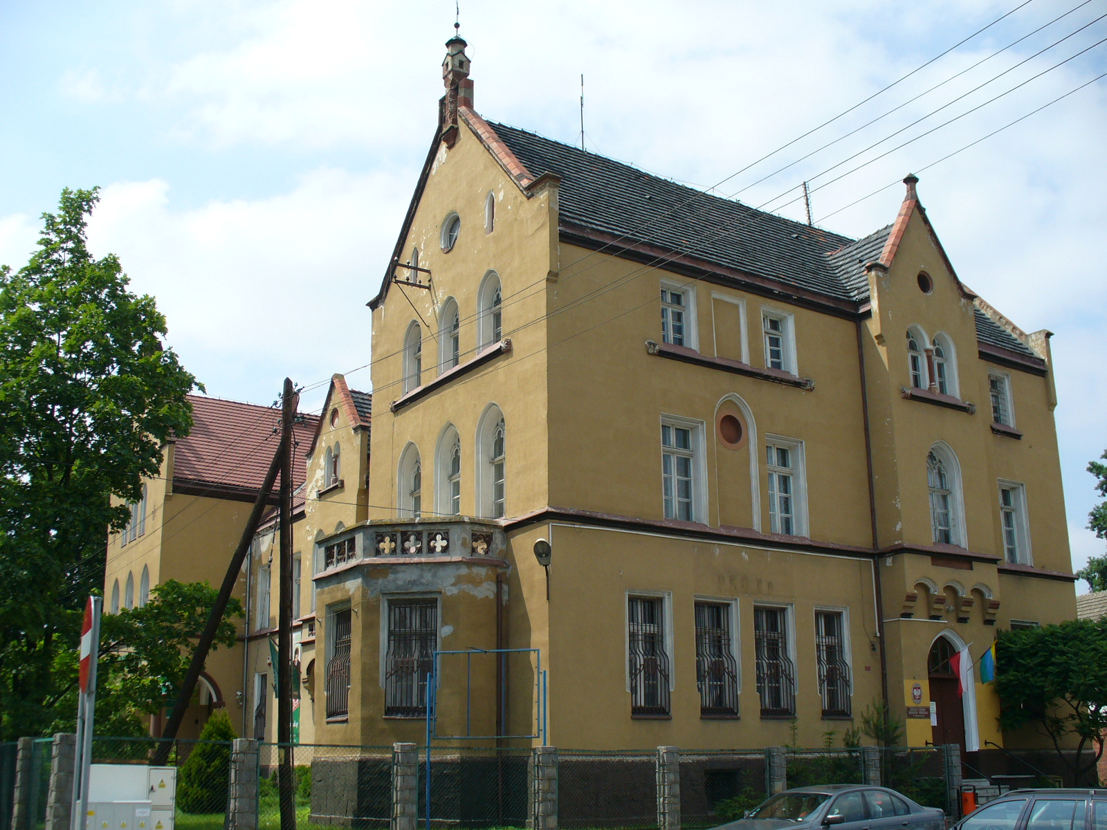 Das ehemalige Kreisständehaus. In dem 1873 erbauten Gebäude waren verschiedene Kreisbehörden wie das Landratsamt untergebracht.